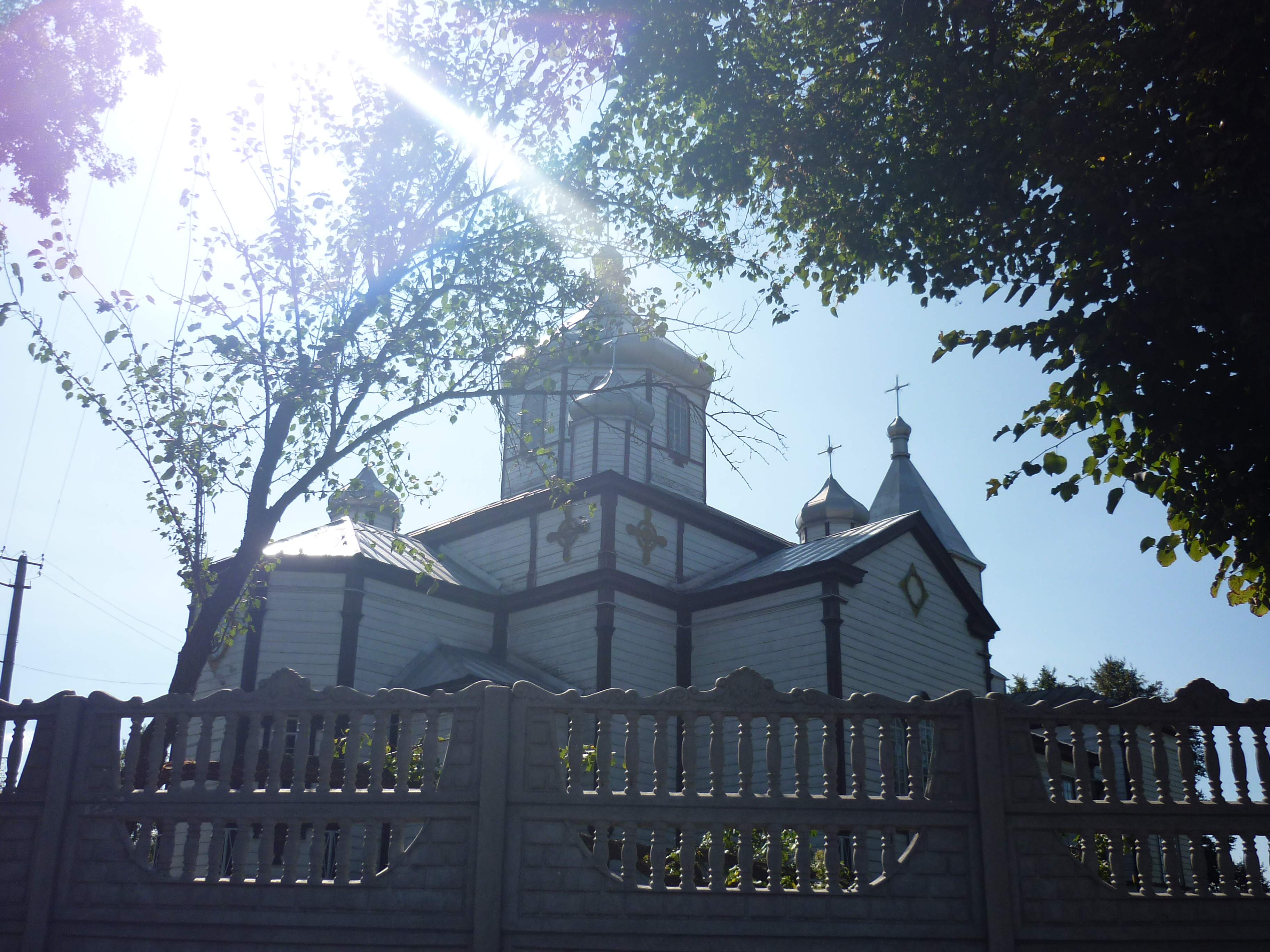 село Михайлівка Кам'янський район Черкаської області